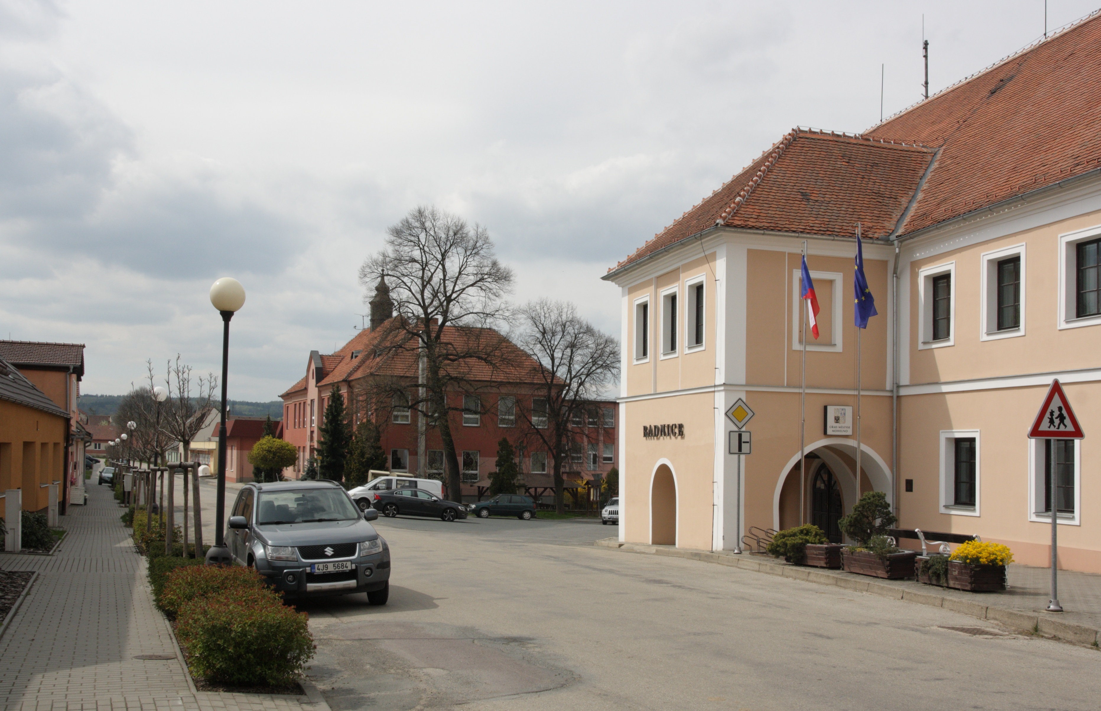 Mohelno - hlavní ulice.